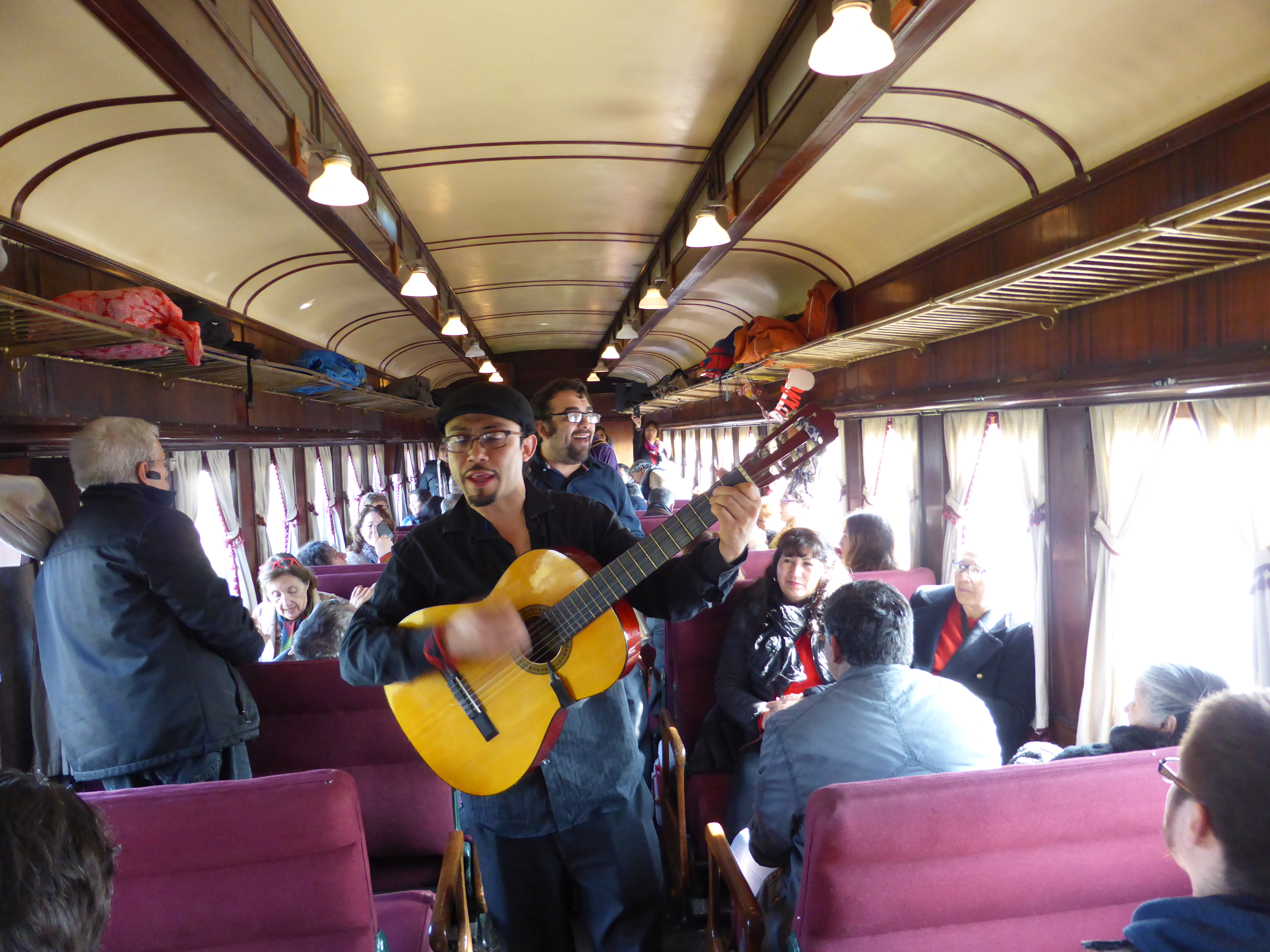 Interior de un coche metálico de primera clase, fabricado por Linke Hofmann, hacia 1923. En el tren turístico a San Antonio (Chile). El grupo musical interpreta composiciones de "cueca".